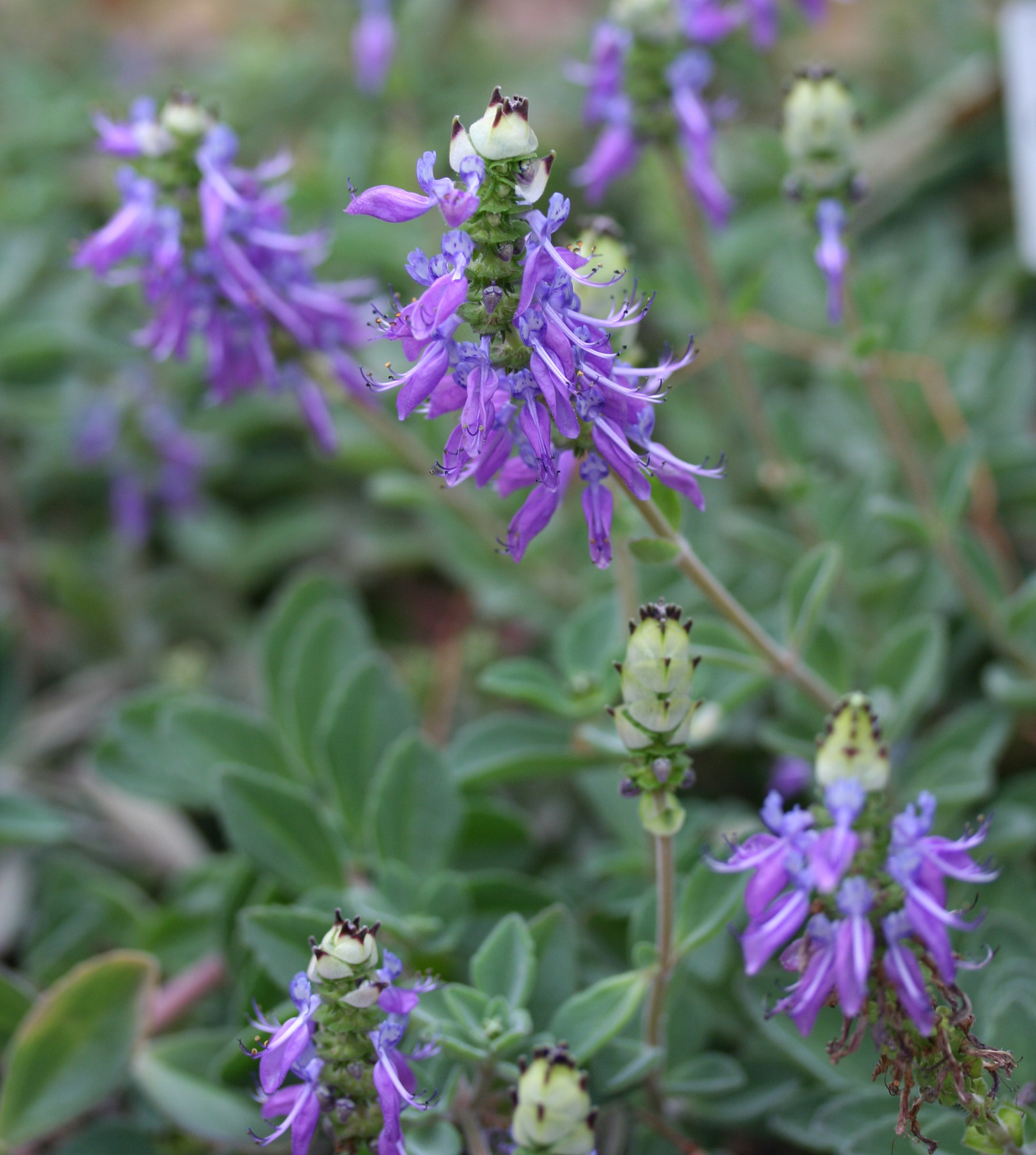 Plectranthus ornatus im Botanischen Garten Dresden